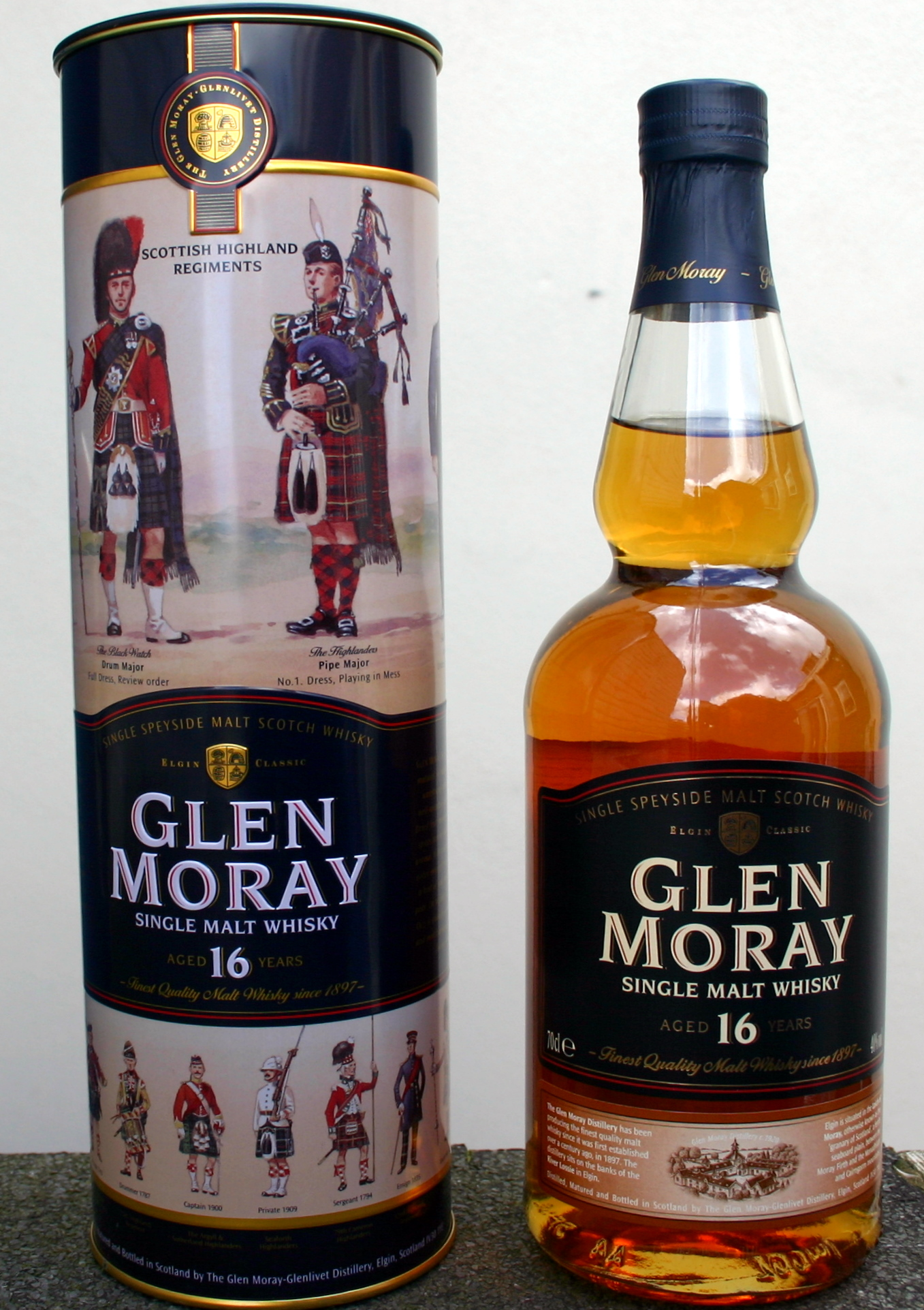 Glen Moray Speyside Single Malt Scotch Whisky 16 years old